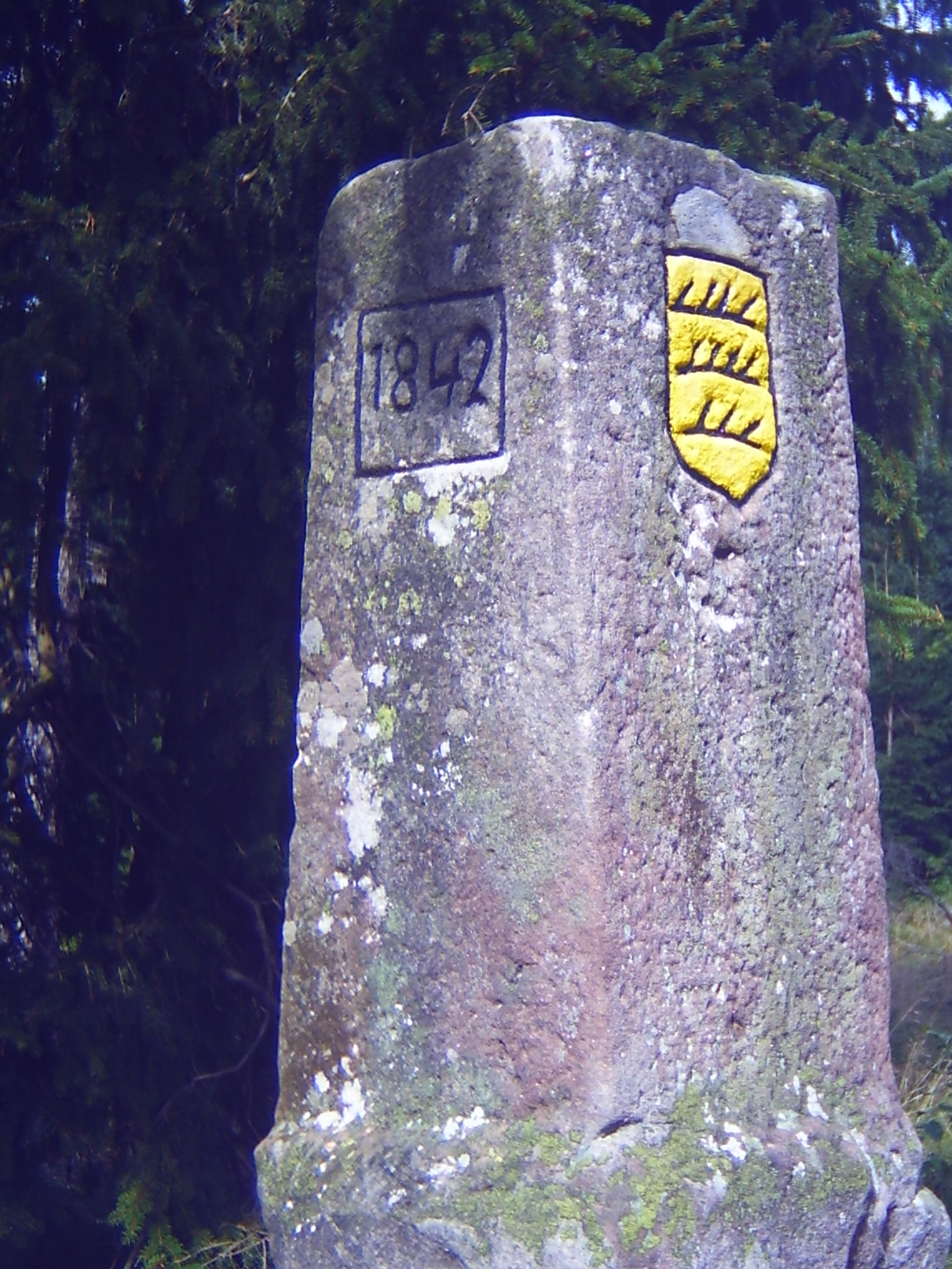 Boundary-Stone between Baden and Württemberg